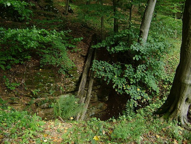 Celkový pohľad na relatívne veľké ústie Priepasti v údolí Szalayovho jazera na Silickej planine v Slovenskom krase. Vstupné časti jaskyne ležia takmer v úrovni dna mohutnej, elipsovito pretiahnutej krasovej jamy. Je len málo jaskýň, ktoré majú takto umiestnené ústia/vchody.